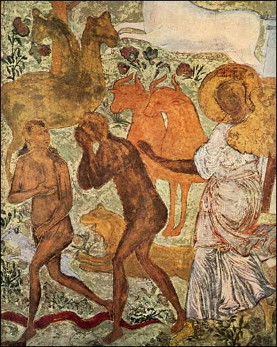 «Expulsion of Adam and Eve». Fresco in Church of John The Baptist in Rotshenie, Russia / Фреска "Изгнание из рая". Фрагмент. Церковь Иоанна Предтечи в Рощенье.